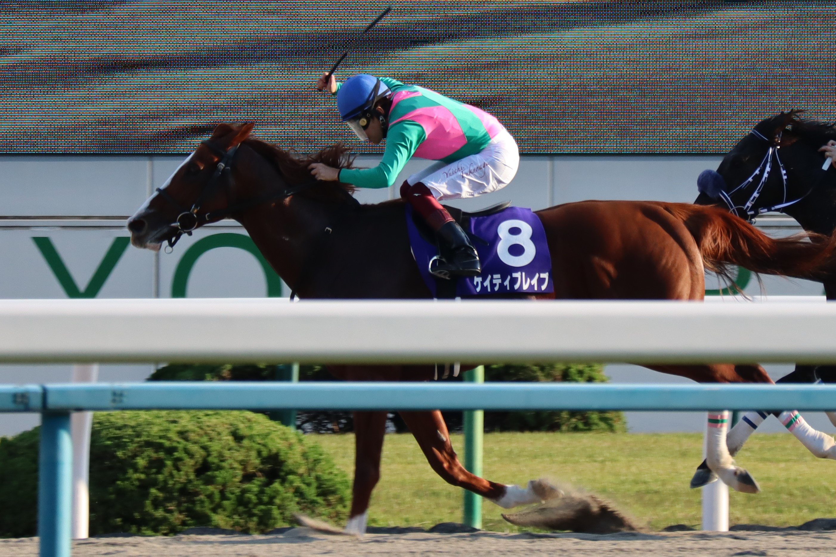 ケイティブレイブ(2019年JBCクラシック出走時)